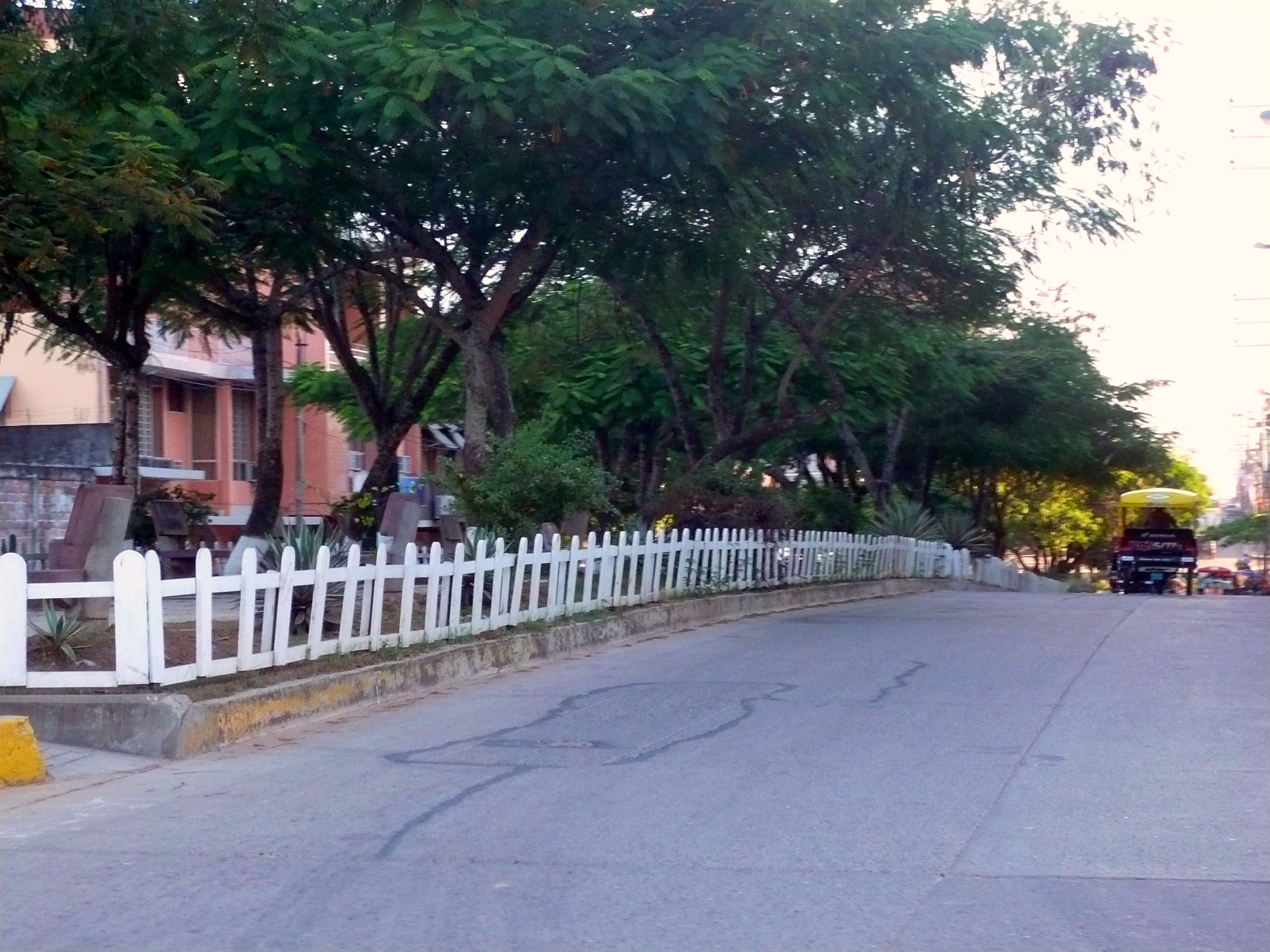 La avenida San Martín, de la ciudad de Pucallpa en medio del hotel Ucayali River.